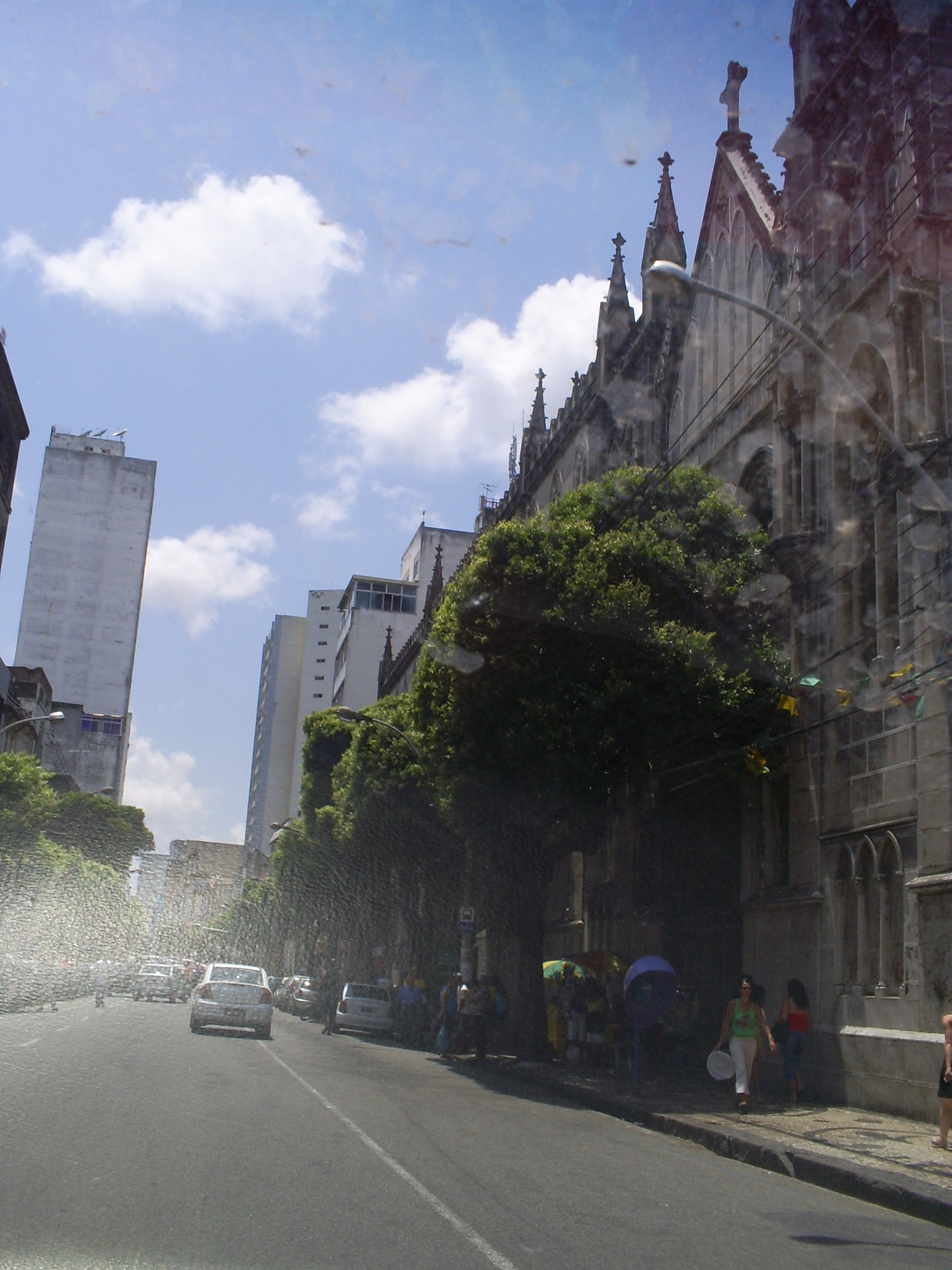 Foto da Avenida Sete de Setembro, Salvador, Bahia, Brasil.